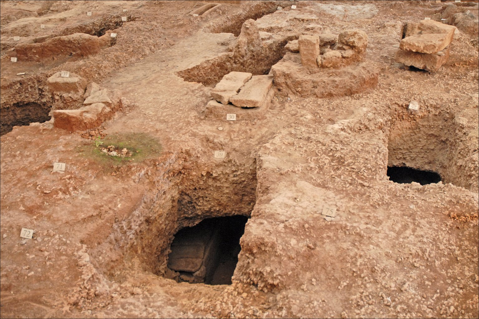 Vue de quelques tombes du site archéologique Palerme a d'abord été un comptoir carthaginois, la première implantation punique à Palerme date du 7ème siècle avant J.-C. Quelques tombes de cette époque ont été retrouvées dans la grande nécropole ouest de la ville antique. La partie de la nécropole photographiée ci-dessus a été fouillée ces dernières années, elle est située sur un terrain militaire sur lequel se trouve également la Cuba, palais de l'époque arabo-normande. Plusieurs types de tombes et de rites (incinération, inhumation,..) ont été découverts sur ce site archéologique dont la période va de la fin du 7ème siècle avant J.-C. au début du 3ème siècle avant J.-C.